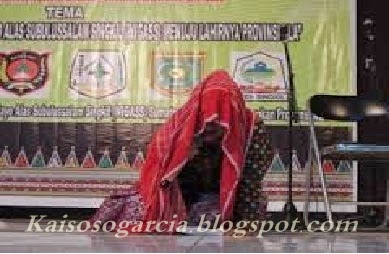 Tangis Dilo Suku Alas (Aefarlava)Riduwan Philly